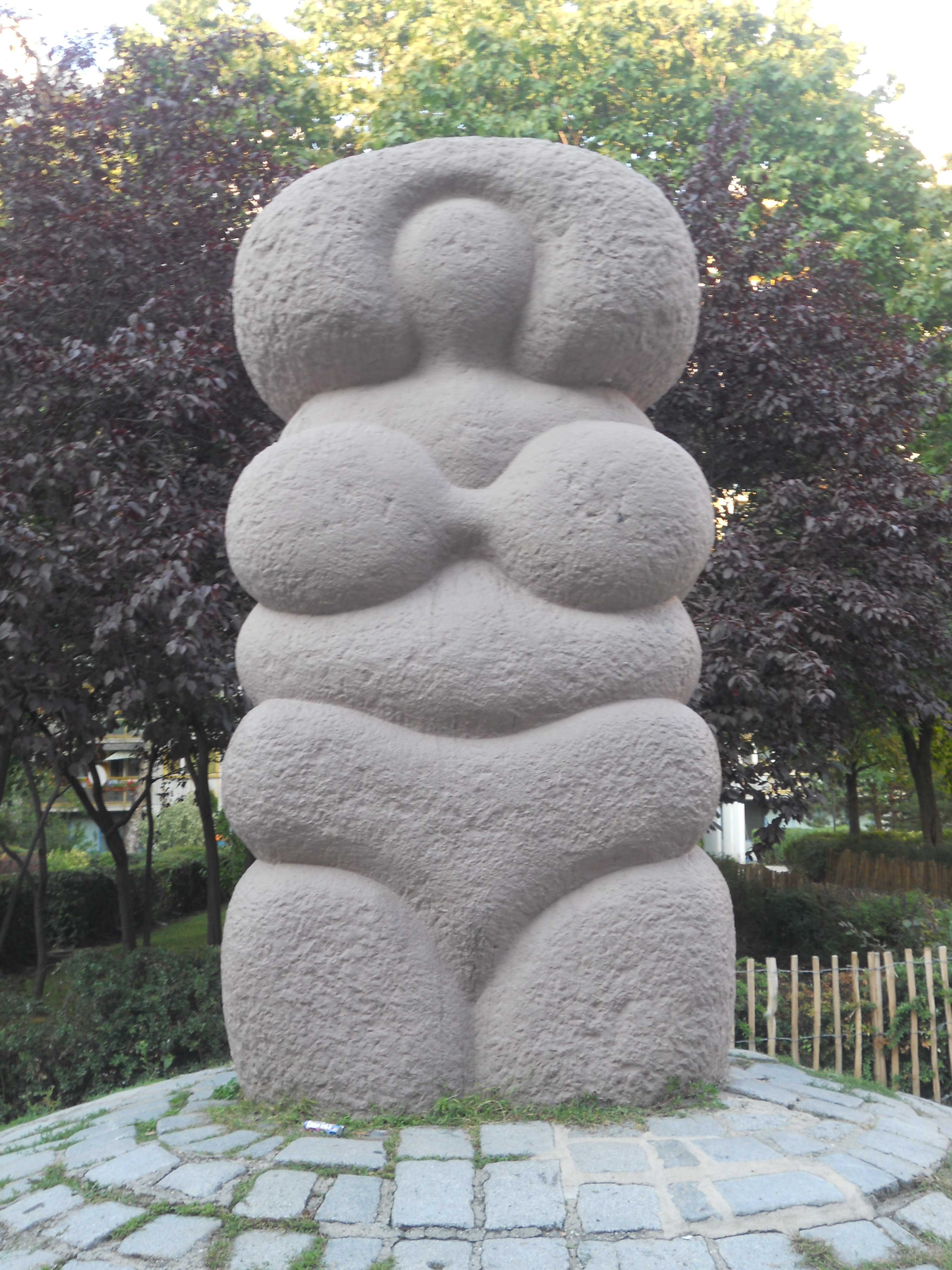 Plastik "Venus" von Gottfried Höllwarth (1975) im Hof der Wohnhausanlage Engerthstraße 203 This media shows the Vienna residential building (Gemeindebau) with the ID 399.